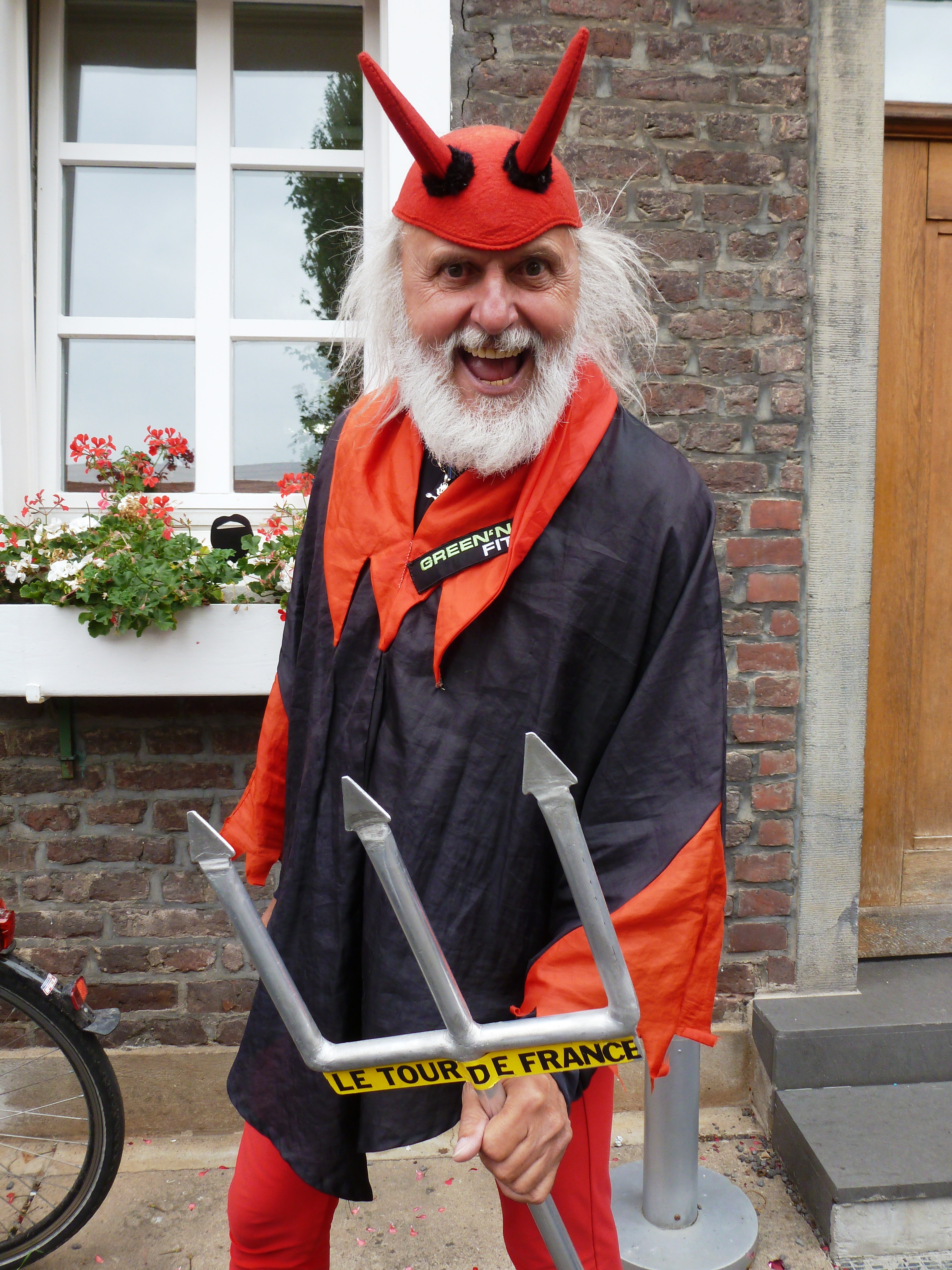 Tour de Magellan 2014, Gut Eltzhof in Köln, Didi Senft